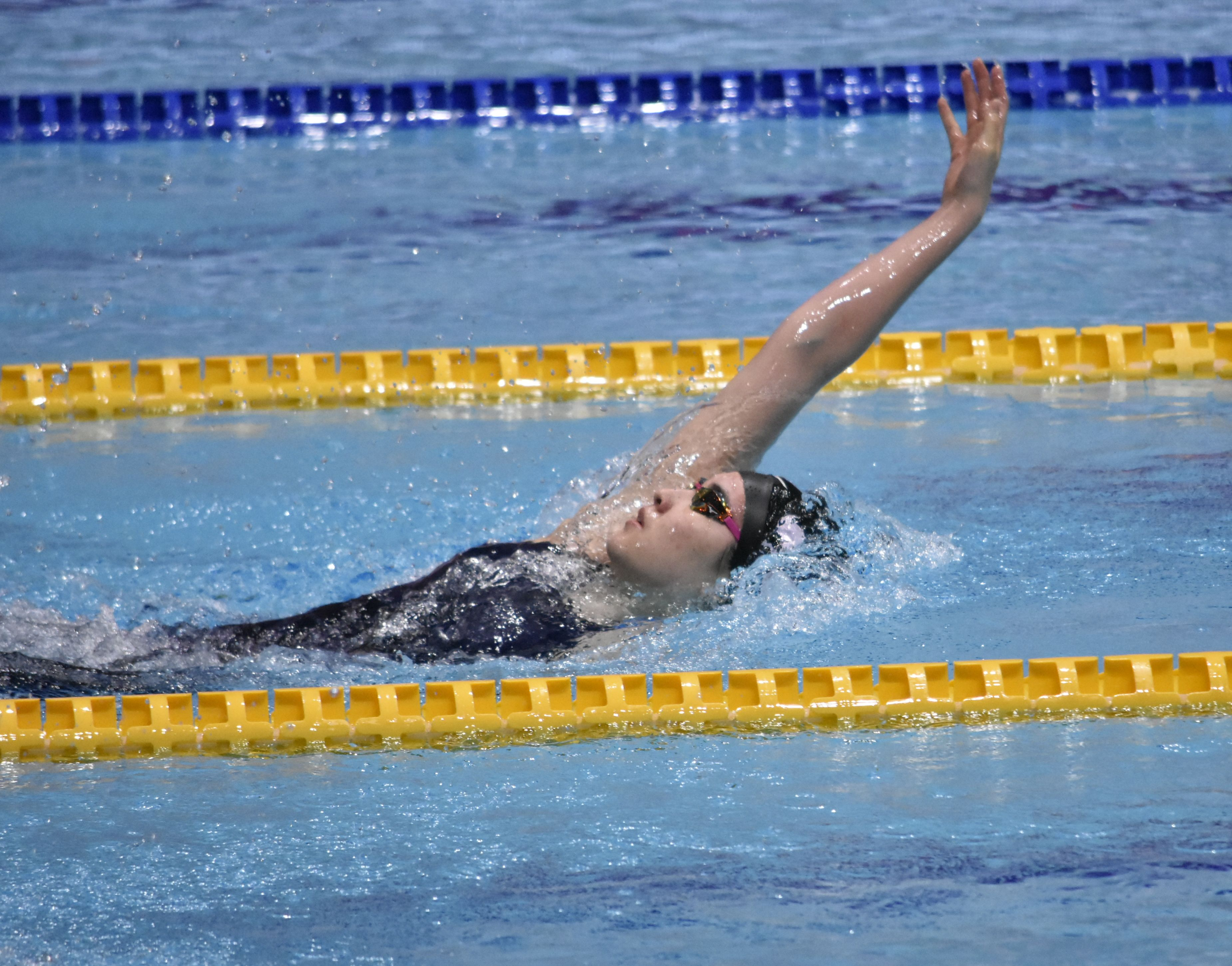 酒井 夏海